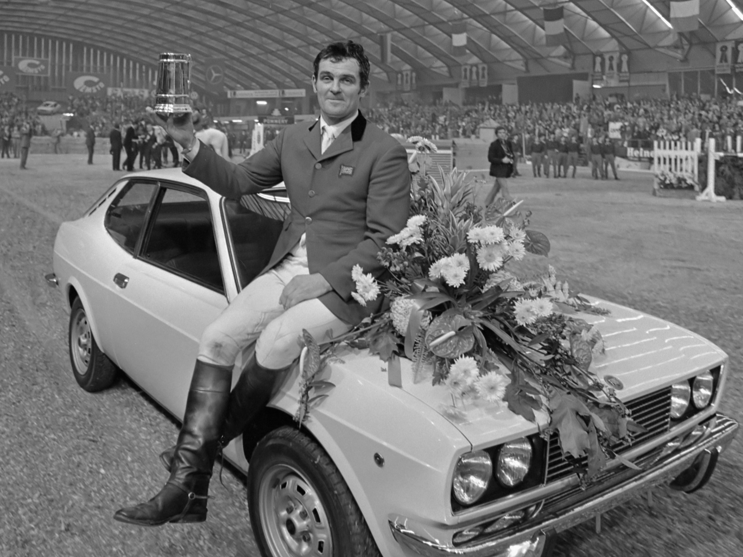 Jumping Amsterdam ; winnaar grote prijs van Nederland, Harvey Smith met gewonnen auto 3 november 1974